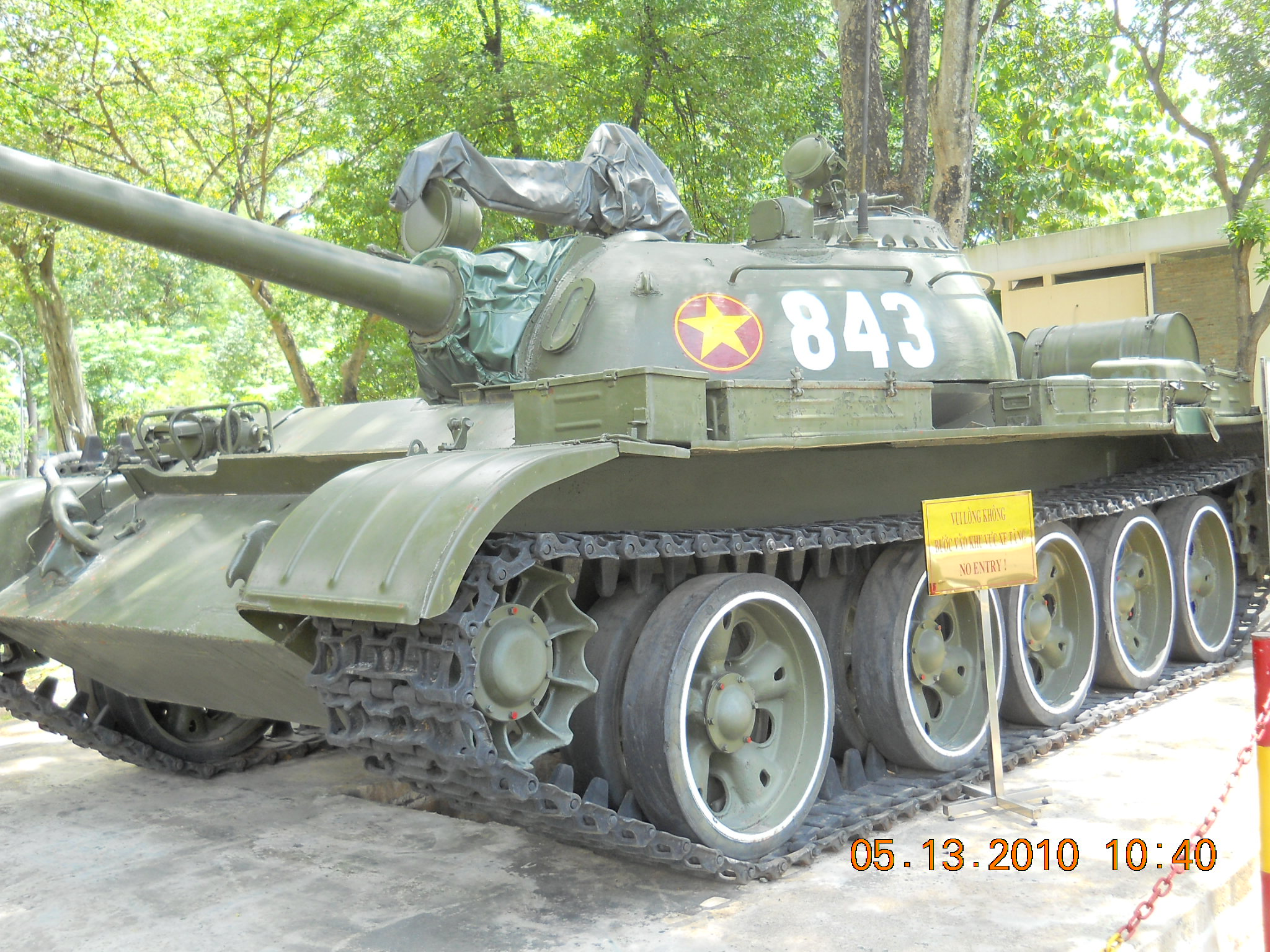 Một trong hai chiếc xe tăng tiến vào dinh Độc lập ngày 30/4/1975 mang số hiệu 843